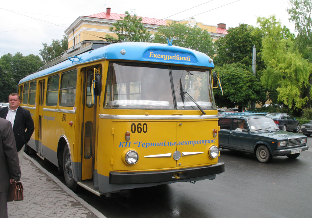 Экскурсионный роллейбус Шкода 9Тр №060 в Тернополе